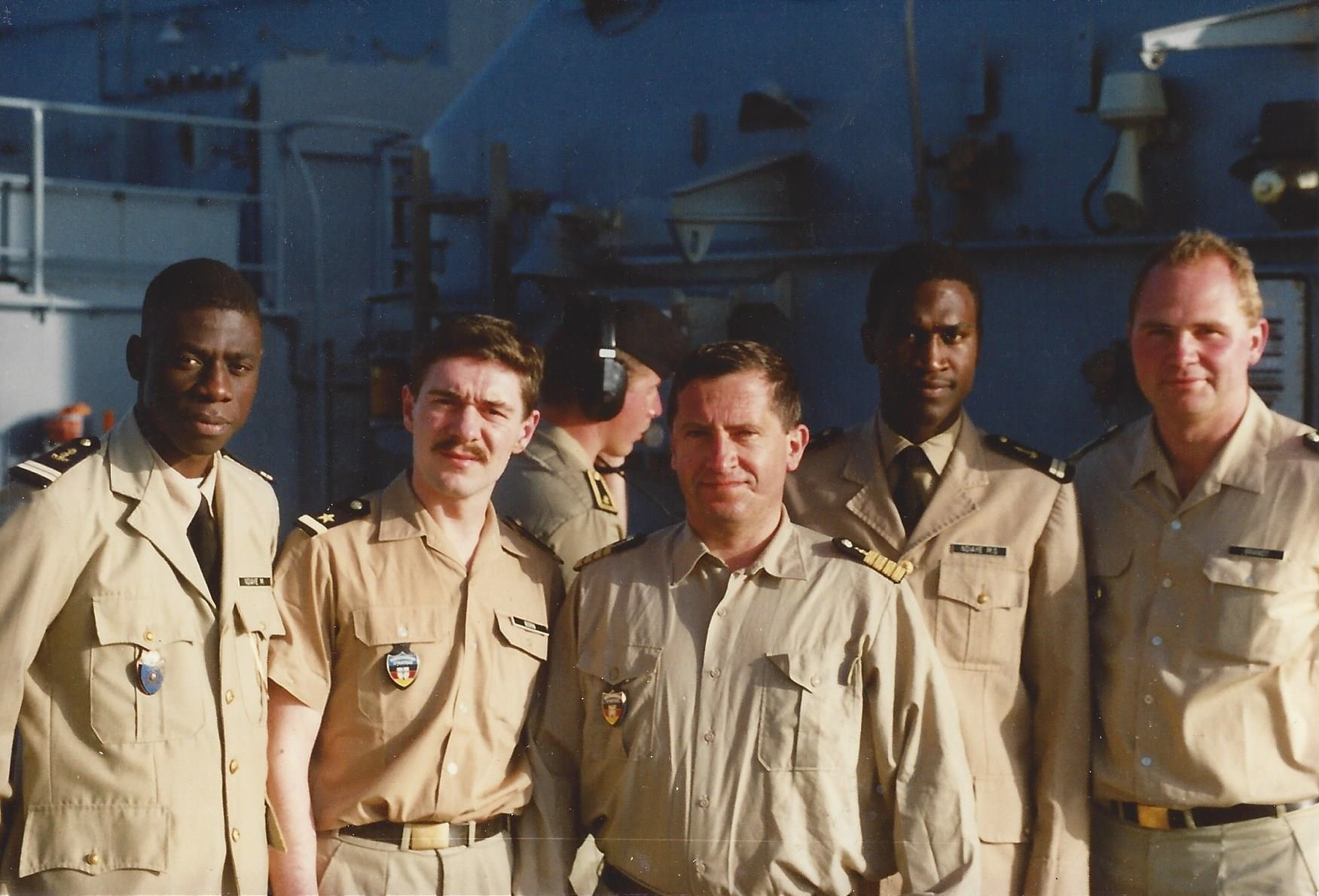 Deutsche und senegalesische Marineofiziere auf der Fregatte Emden (F 210) in Dakar